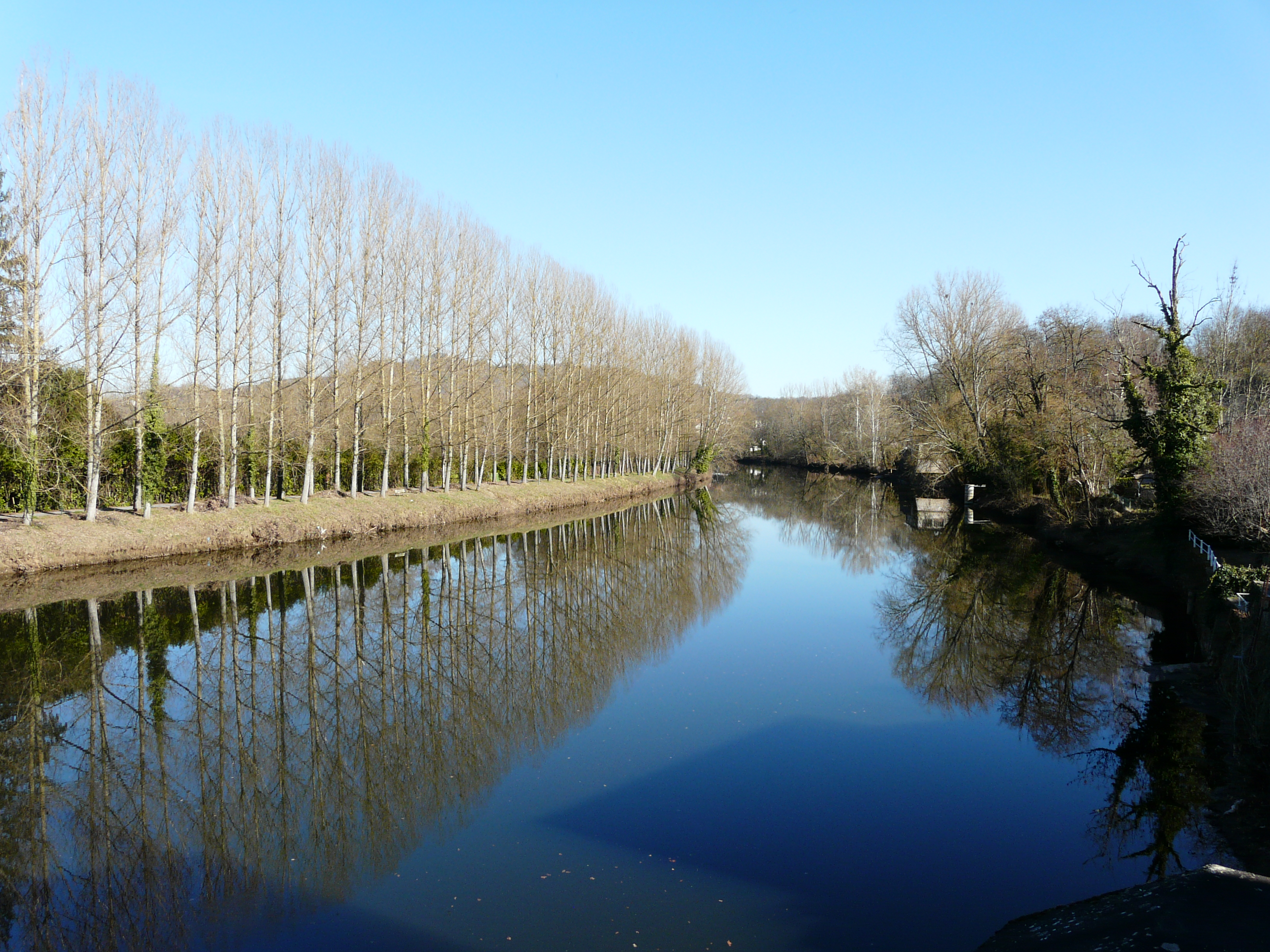 En amont du pont de la route départementale 19, la Vézère marque la limite entre Saint-Pantaléon-de-Larche (à gauche) et Larche (en rive opposée), Corrèze, France.